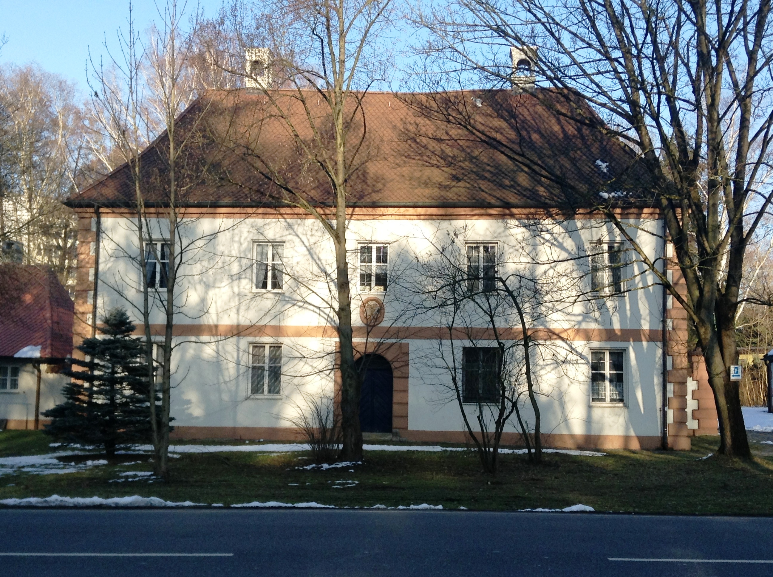 Nuernberg Altenfurt Ehemaliger Scheurl’scher Herrensitz